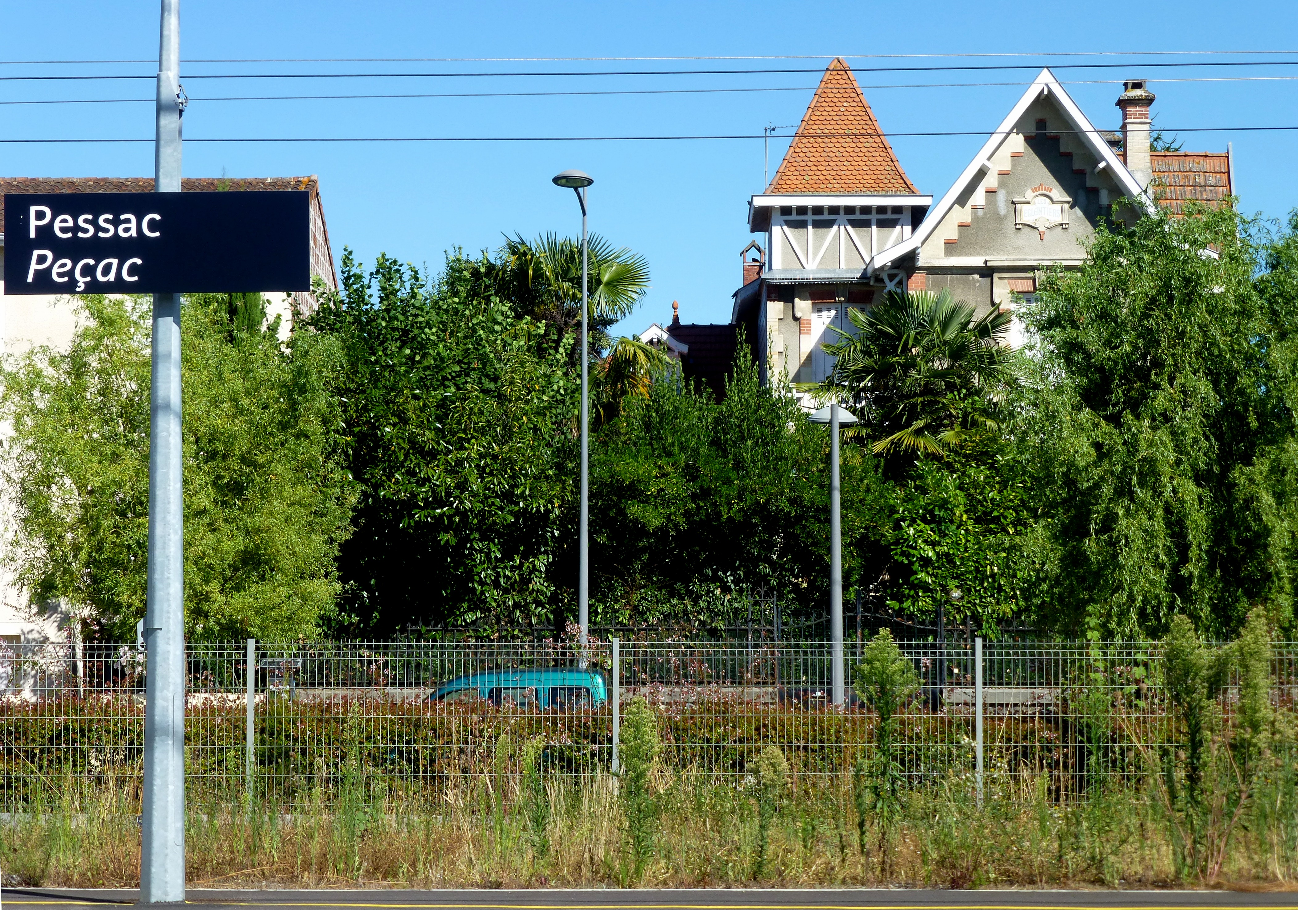 Gare de Pessac-33 ː signalisation bilingue.